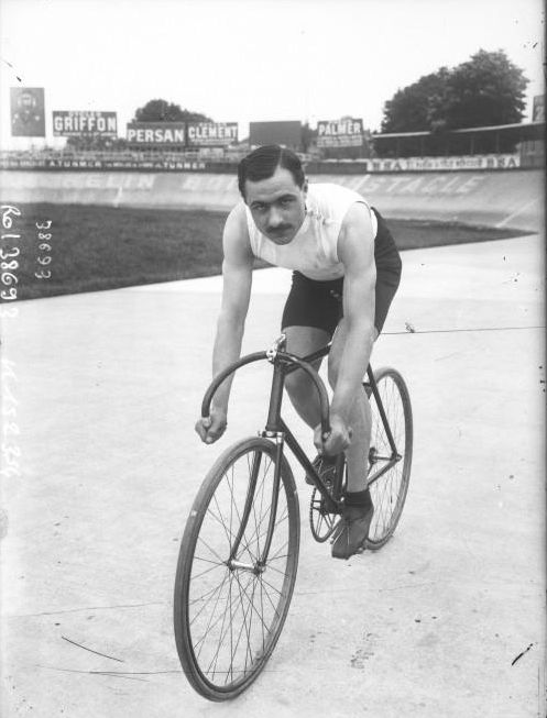 Dupuy [portait du coureur cycliste sur son vélo]